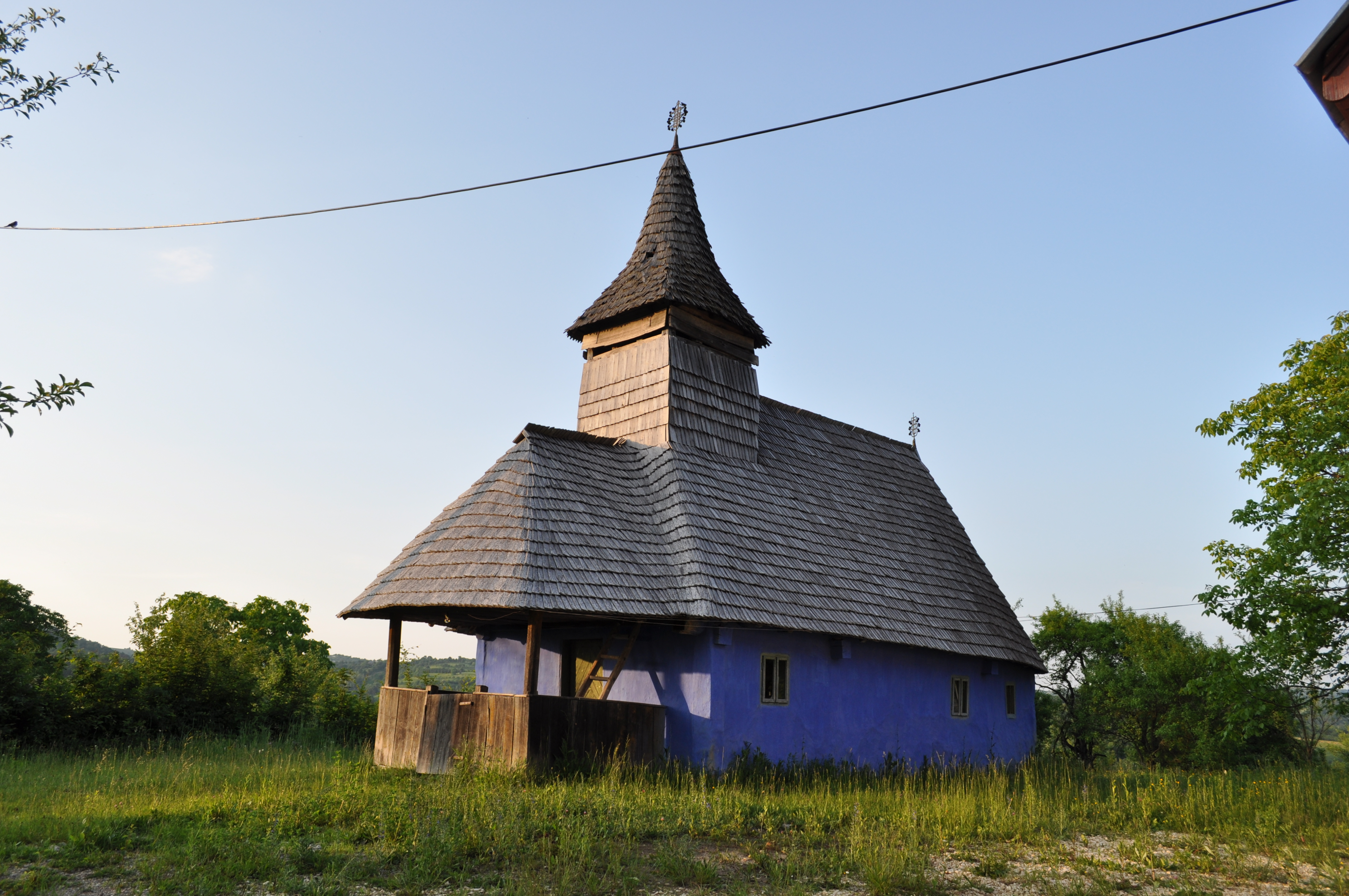 Biserica de lemn "Sfinții Împăraţi" din Aspra